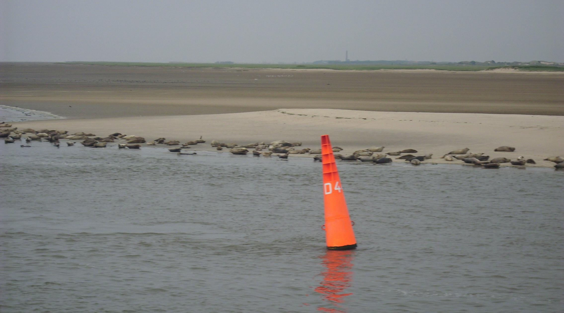 Seehunde am Ostende der Insel Norderney, fotografiert vom Wichter Ee